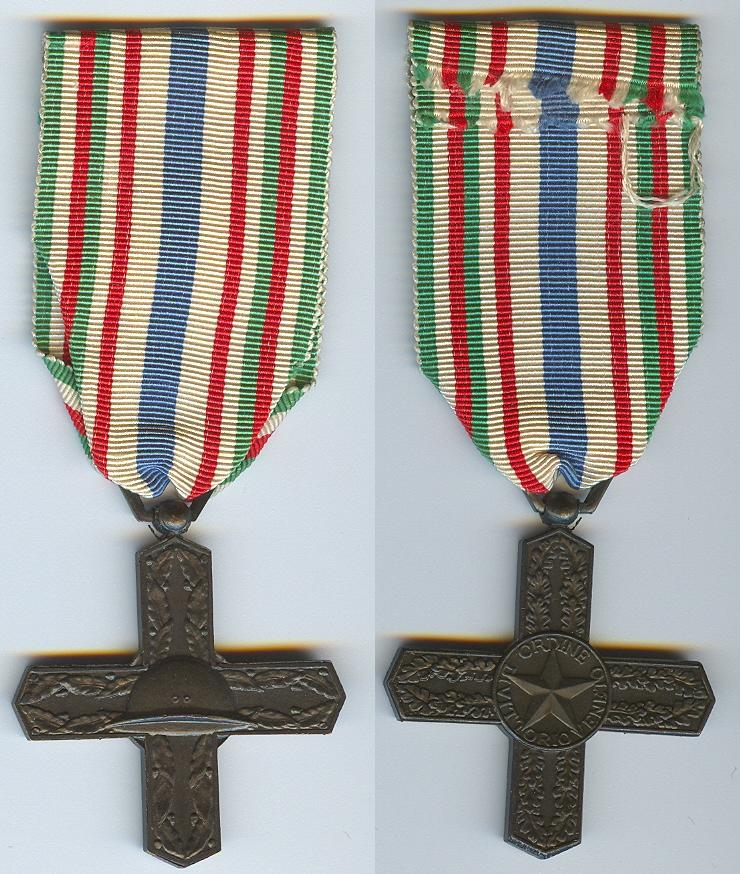 Croce da cavaliere dell'Ordine di Vittorio Veneto. Sono il proprietario della croce